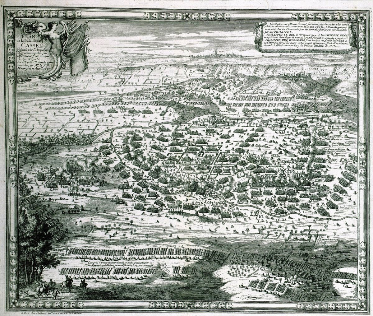 Kupferstich der Schlacht bei Cassel (1677) von Sebastian Beaulieu. Originalbeschreibung: Plan de la Bataille de Cassel. Gagnée par l'Armée du Roy commandée par Monsieur frere unique de Sa Majesté sur l'armée d'Holande commandée par M.r le P.ce d'Orange le 11. Avril 1677